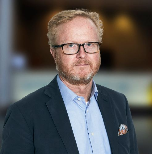 Företagsledaren Lars-Johan Jarnheimer.